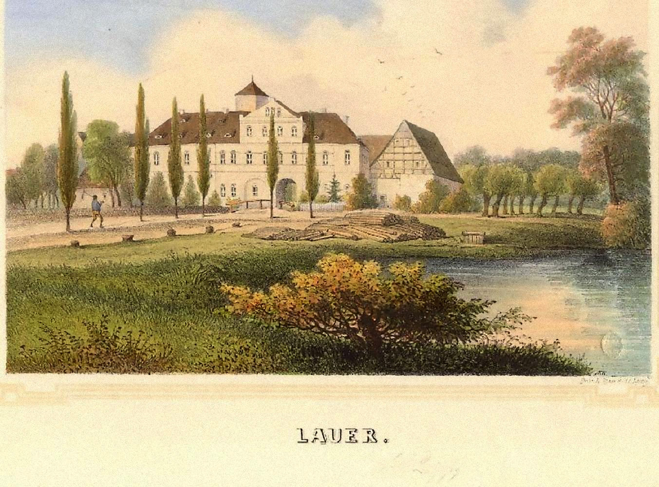 Farbige Lithographie des Gutes Lauer um 1840